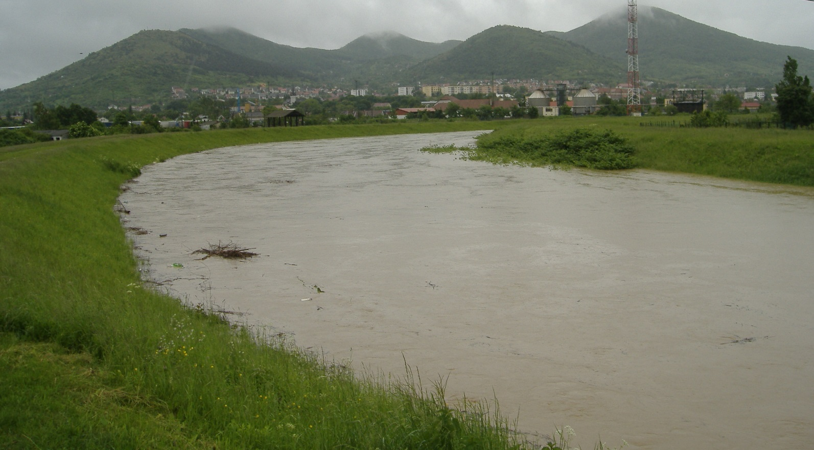 A Ronyva mesterséges mederben Sátoraljaújhelynél